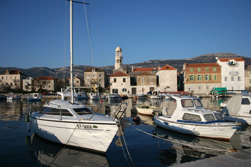 Kastel Stari in Kroatien